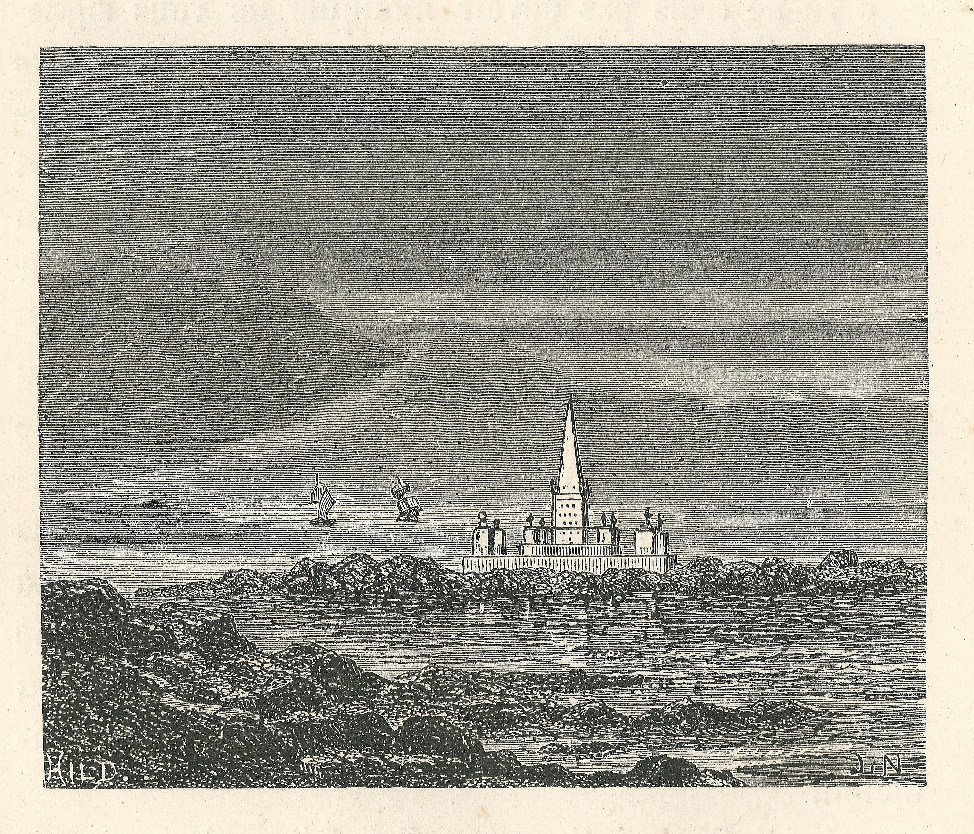 Vignette du monument commémoratif érigé par les soins du ministère de la guerre et de la marine sur l'île Lavezzi, au pied de laquelle la frégate La Sémillante s'engloutit corps et biens en février 1855.